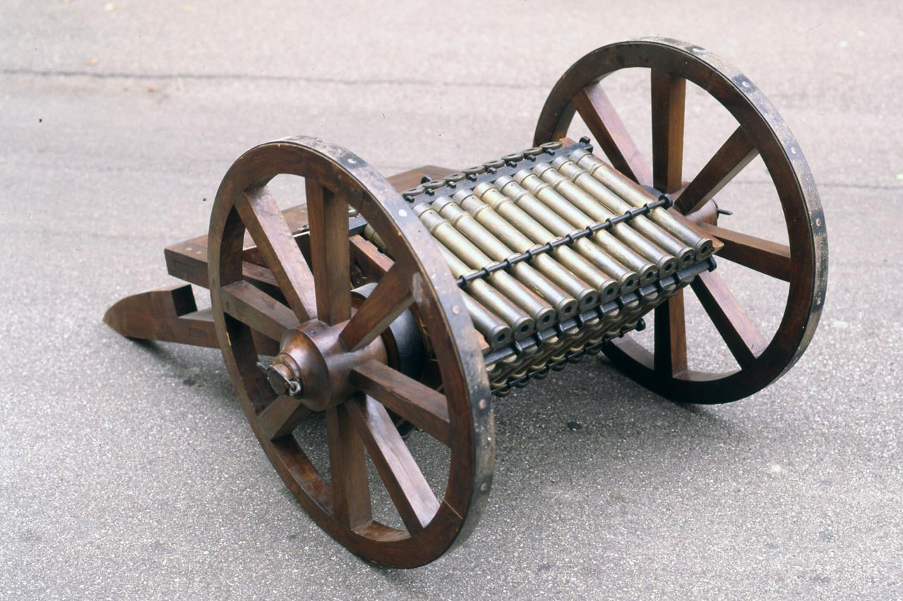 Questo modello rappresenta una batteria di cannoni costituita da 33 piccole bocche da fuoco ordinate in tre file da 11 ciascuna su unico telaio rotante. Le bocche da fuoco ad avancarica sono fissate al telaio con una cerniera che ne permette la rotazione verso l'alto per il caricamento. Una vite senza fine è inserita nell'affusto Funzione Il cannone multiplo ad avancarica e bocca da fuoco in bronzo, era destinata ad affiancare le azioni della fanteria. Modalità d'uso Scaricata la prima fila, l'artigliere avrebbe potuto successivamente mettere in posizione di fuoco la seconda e la terza. Una volta caricate, le canne sono trattenute in posizione da un'asta di metallo fissata ai lati mediante cavicchi. La vite senza fine permetteva di variare l'alzo del tiro.